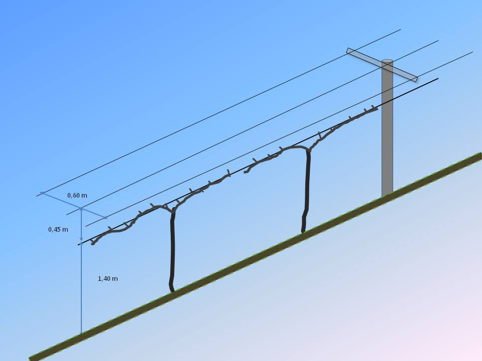 T Erziehung mit Kordon